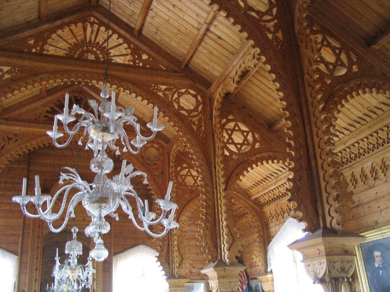 Lysøen